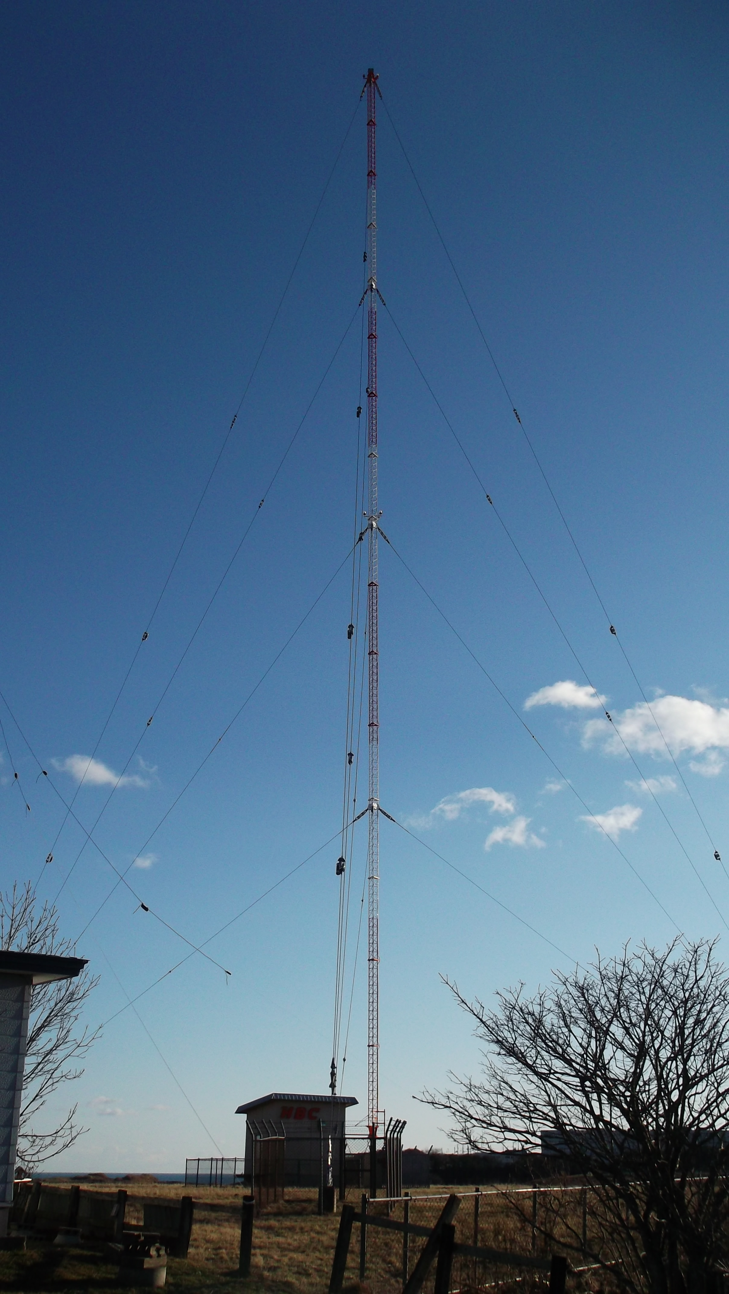 北海道放送 根室ラジオ中継局